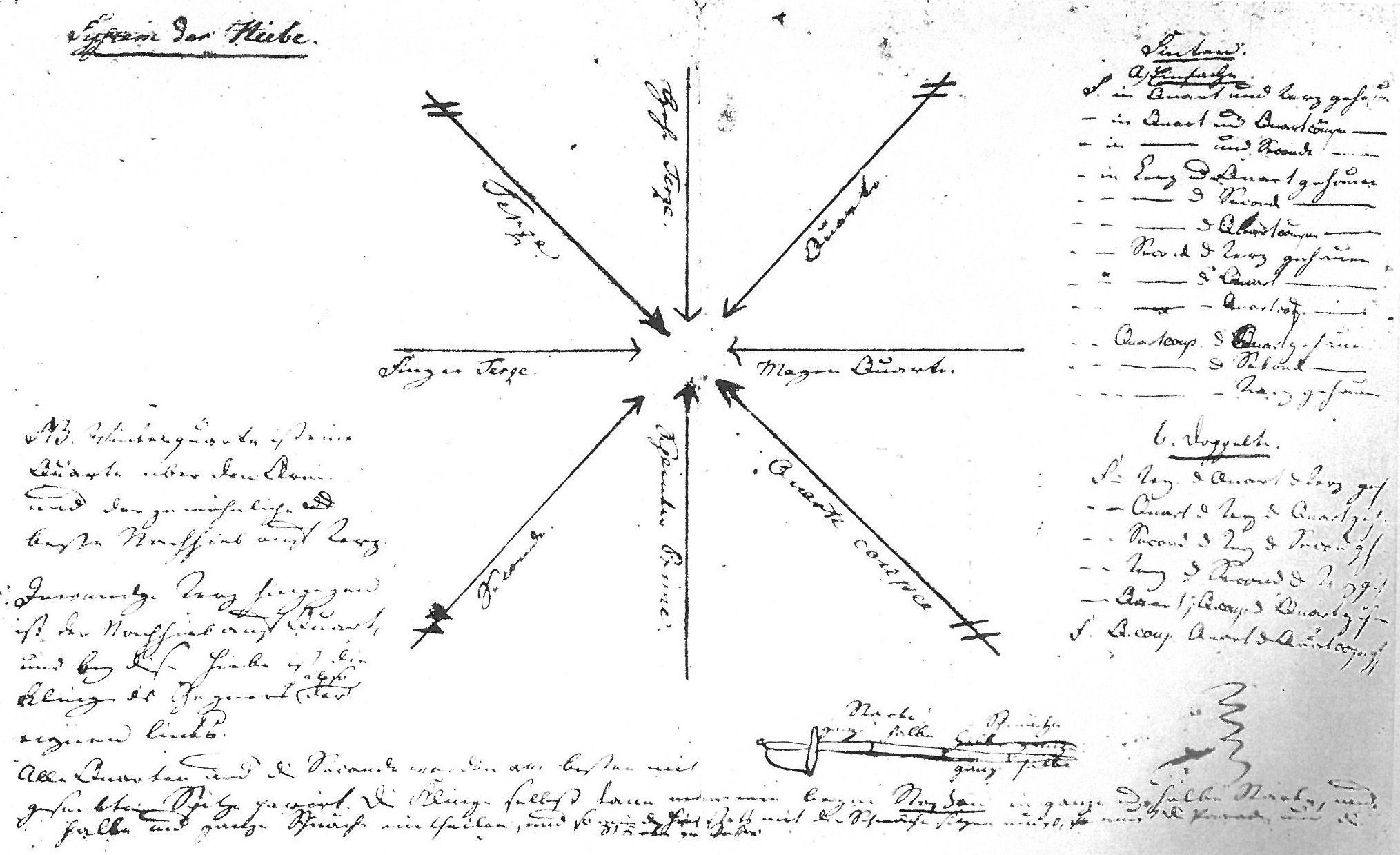 Systematische Darstellung des Systems der Hiebe beim Akademischen Fechten anfangs des 19. Jahrhunderts skizziert von Theodor Körner in seiner Zeit als Student in Freiberg/Sachsen 1808/10